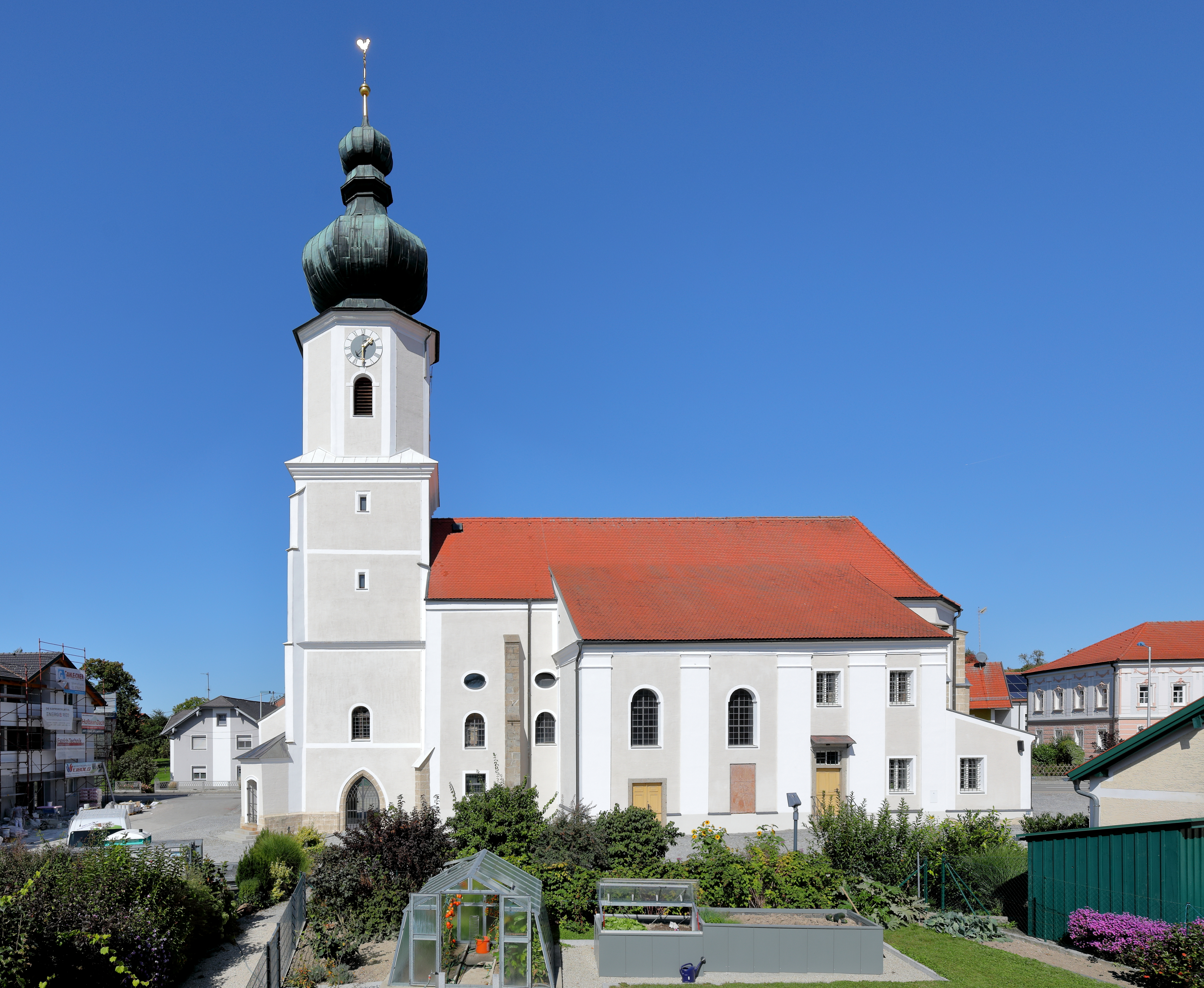 Südansicht der röm.-kath. Pfarrkirche Mariä Himmelfahrt in der oberösterreichischen Gemeinde Utzenaich.